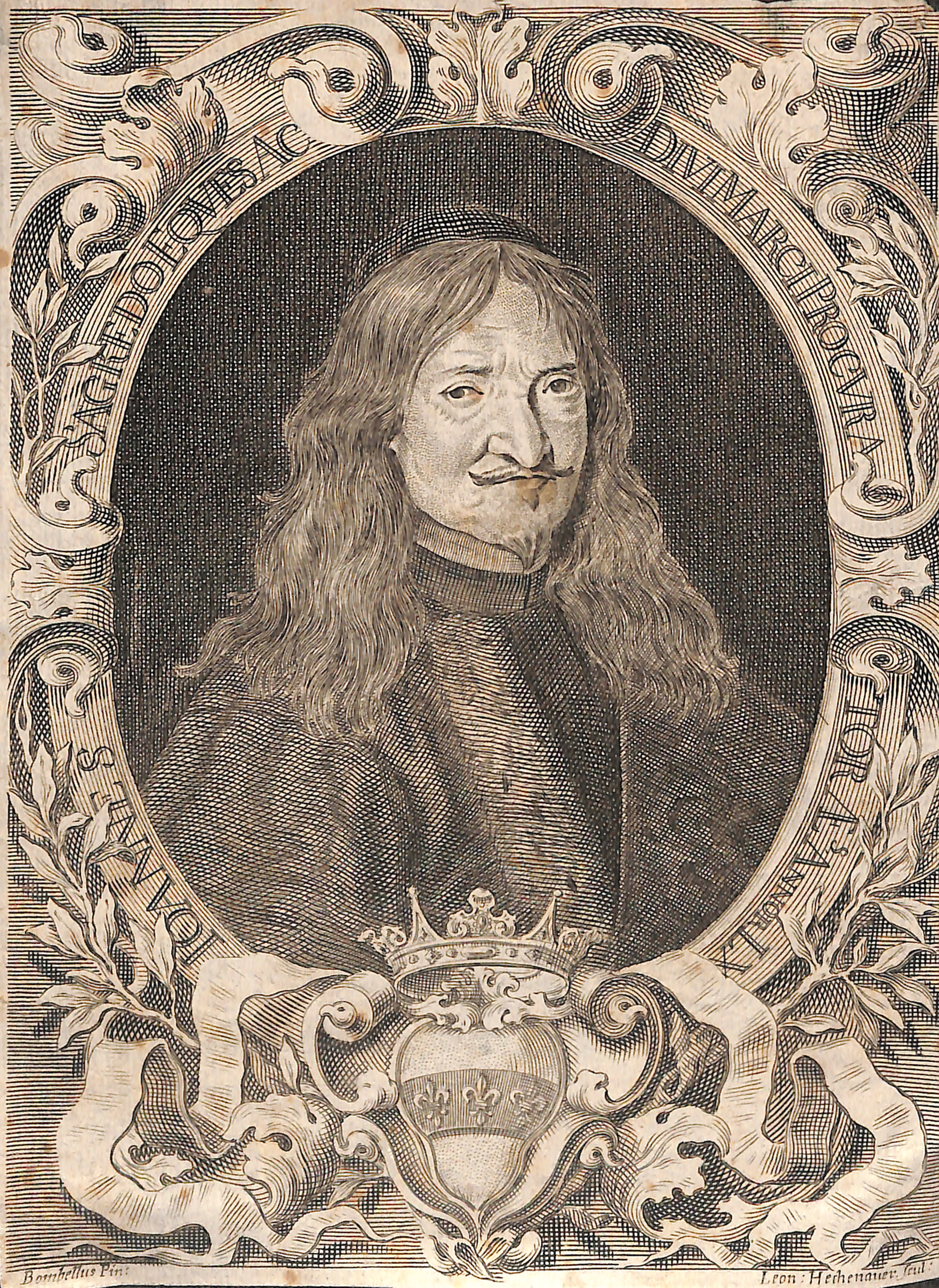 Portrait de Giovanni Sagredo (1616-1691)